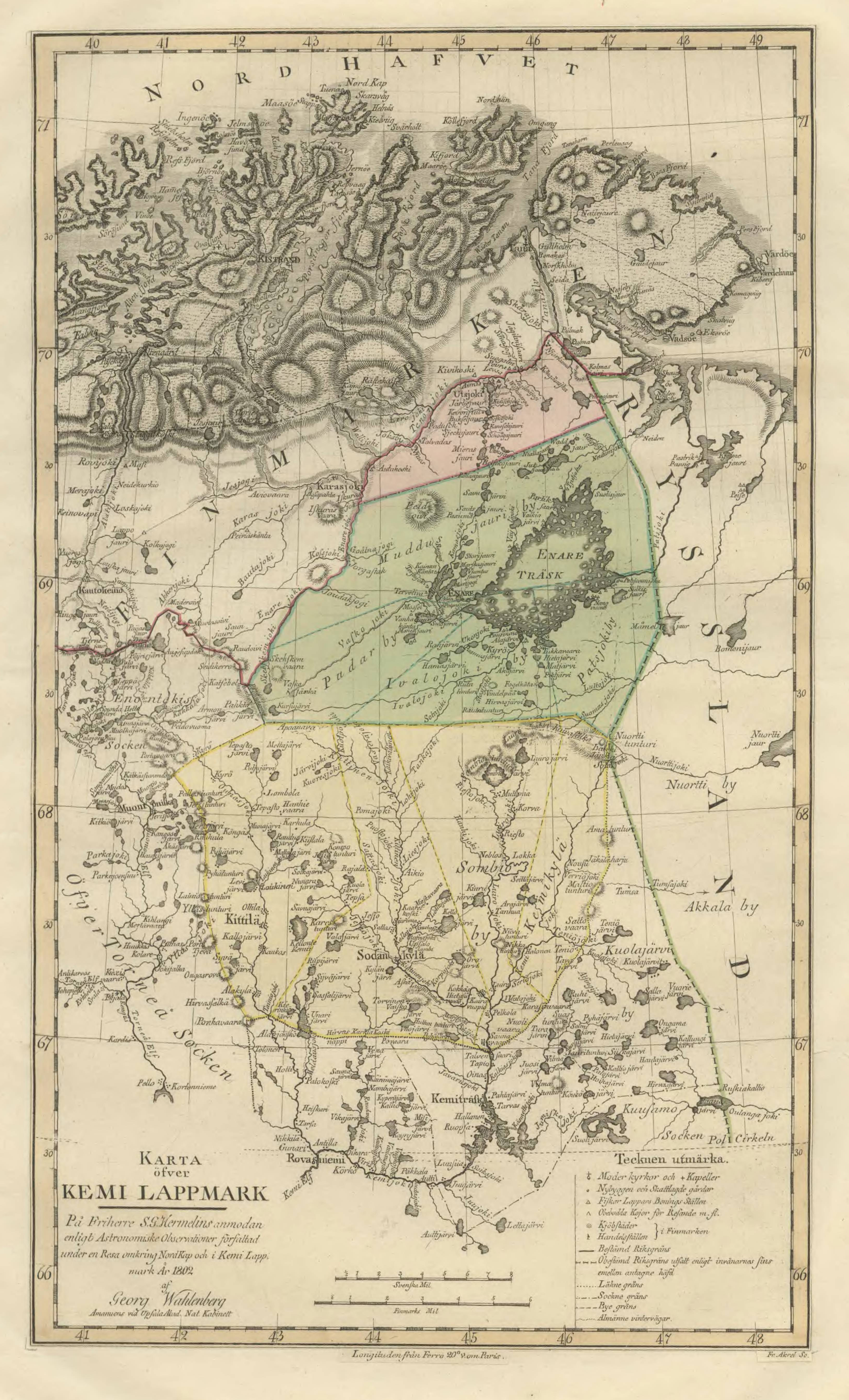 Karta öfver Kemi Lappmark